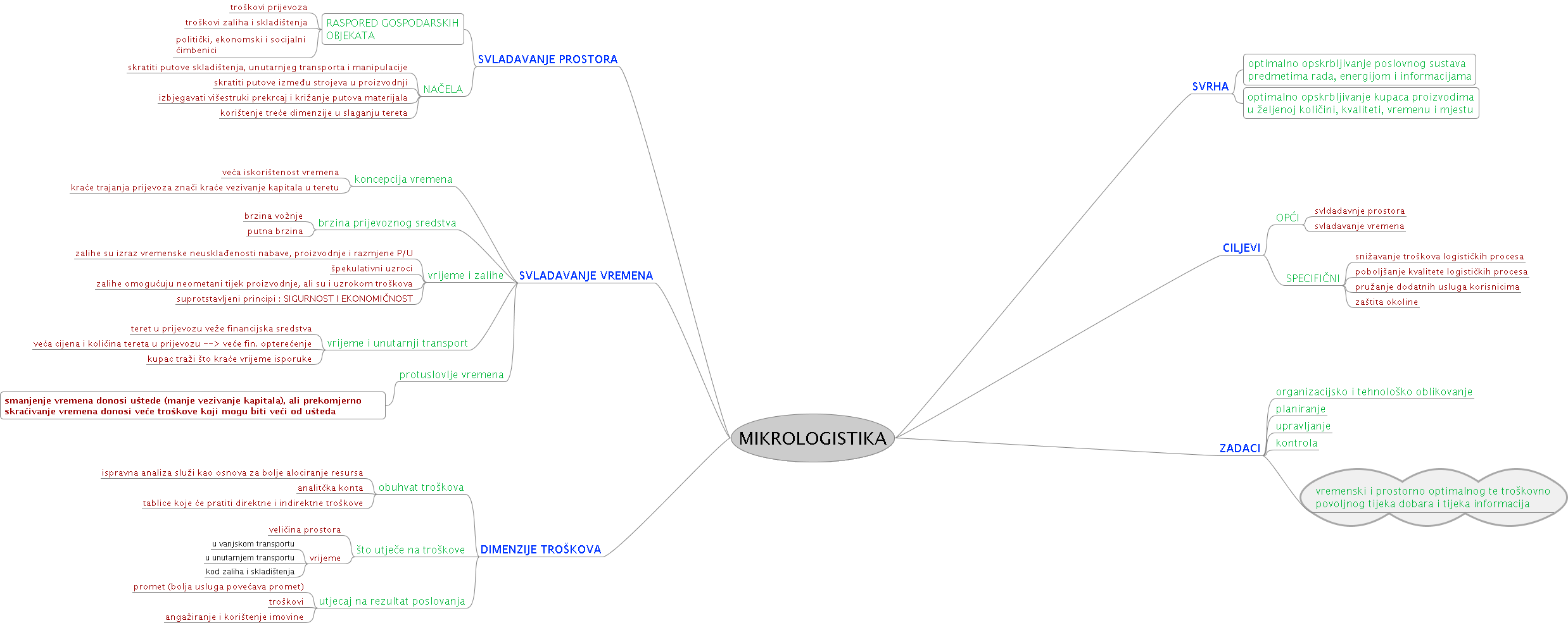 Mikrologistika